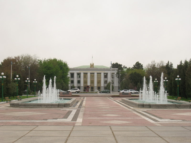 Universiteit van Ashgabat